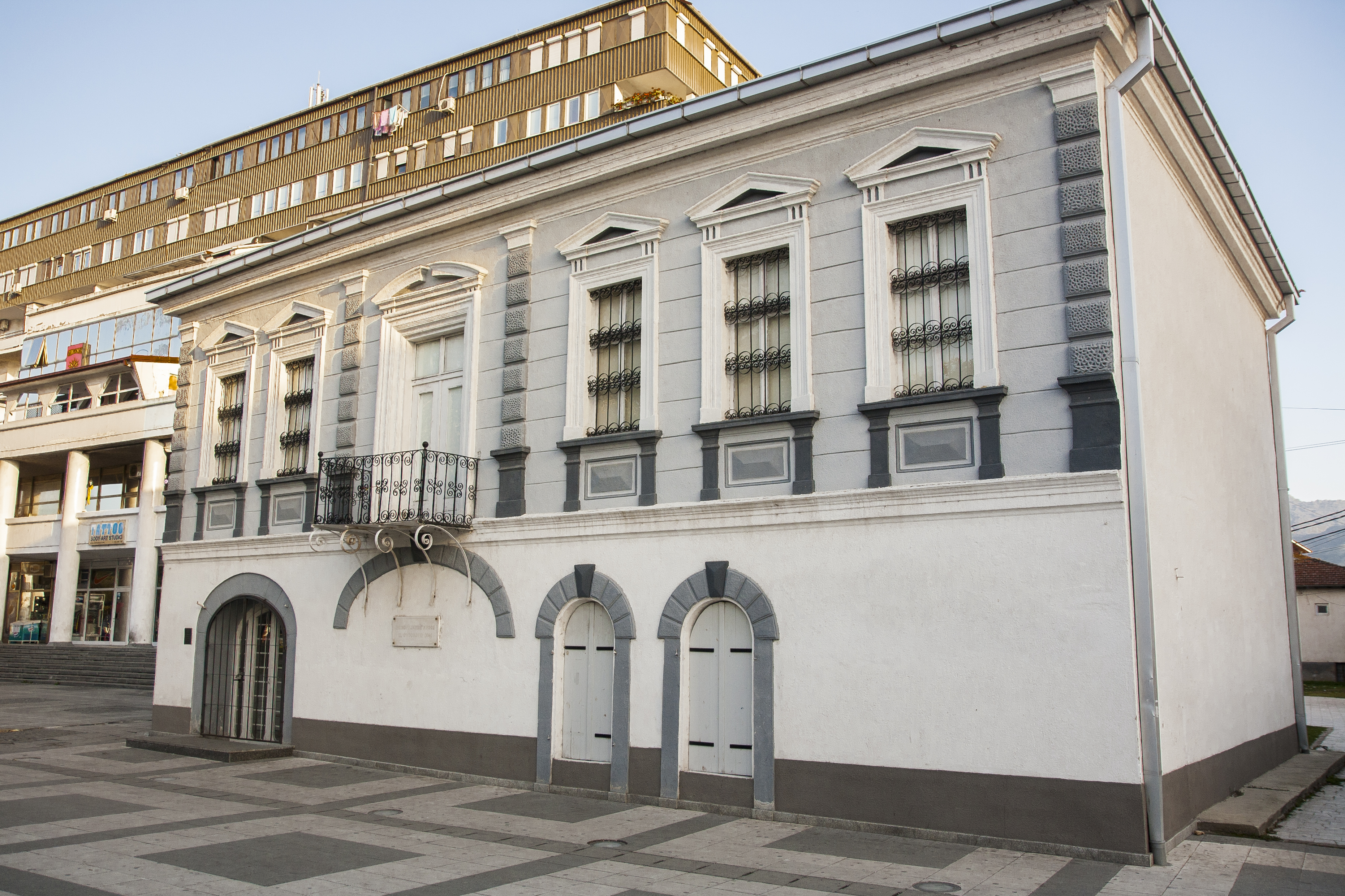 Меморијален музеј “11-ти Октомври 1941“